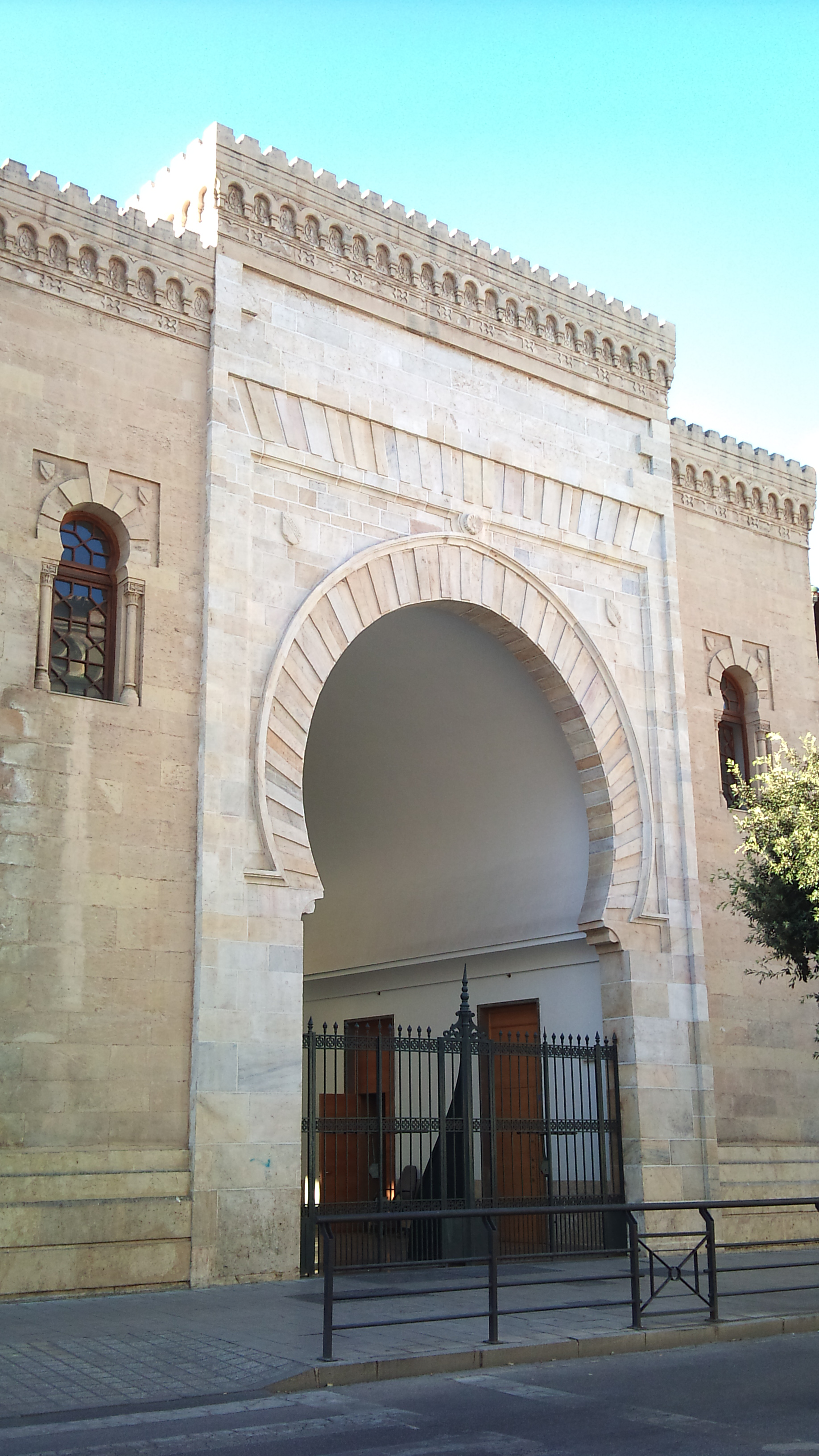 Puertas del mercado de las Atarazanas de Málaga, España